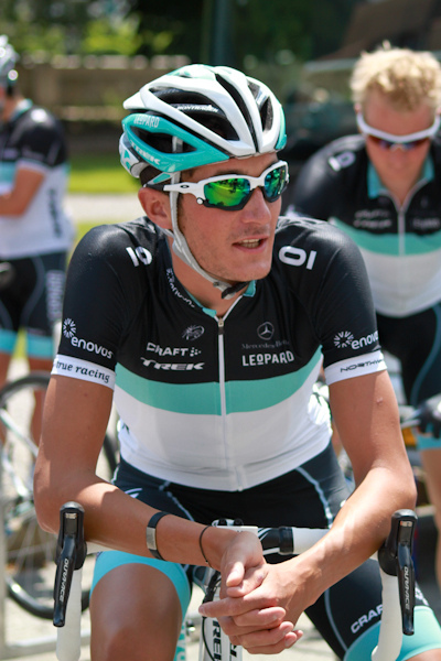 Etape 1 (Albertville) du Critérium du Dauphiné 2011